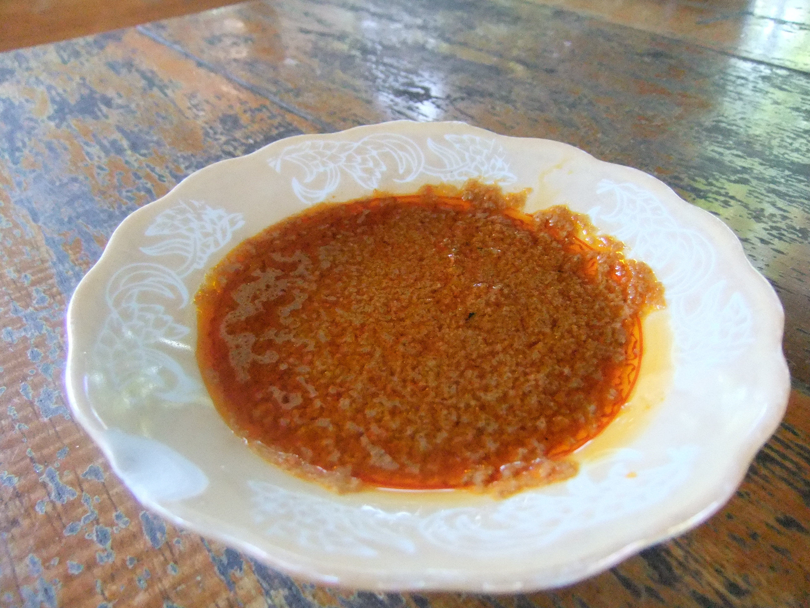 Sambal ayam khas Taliwang